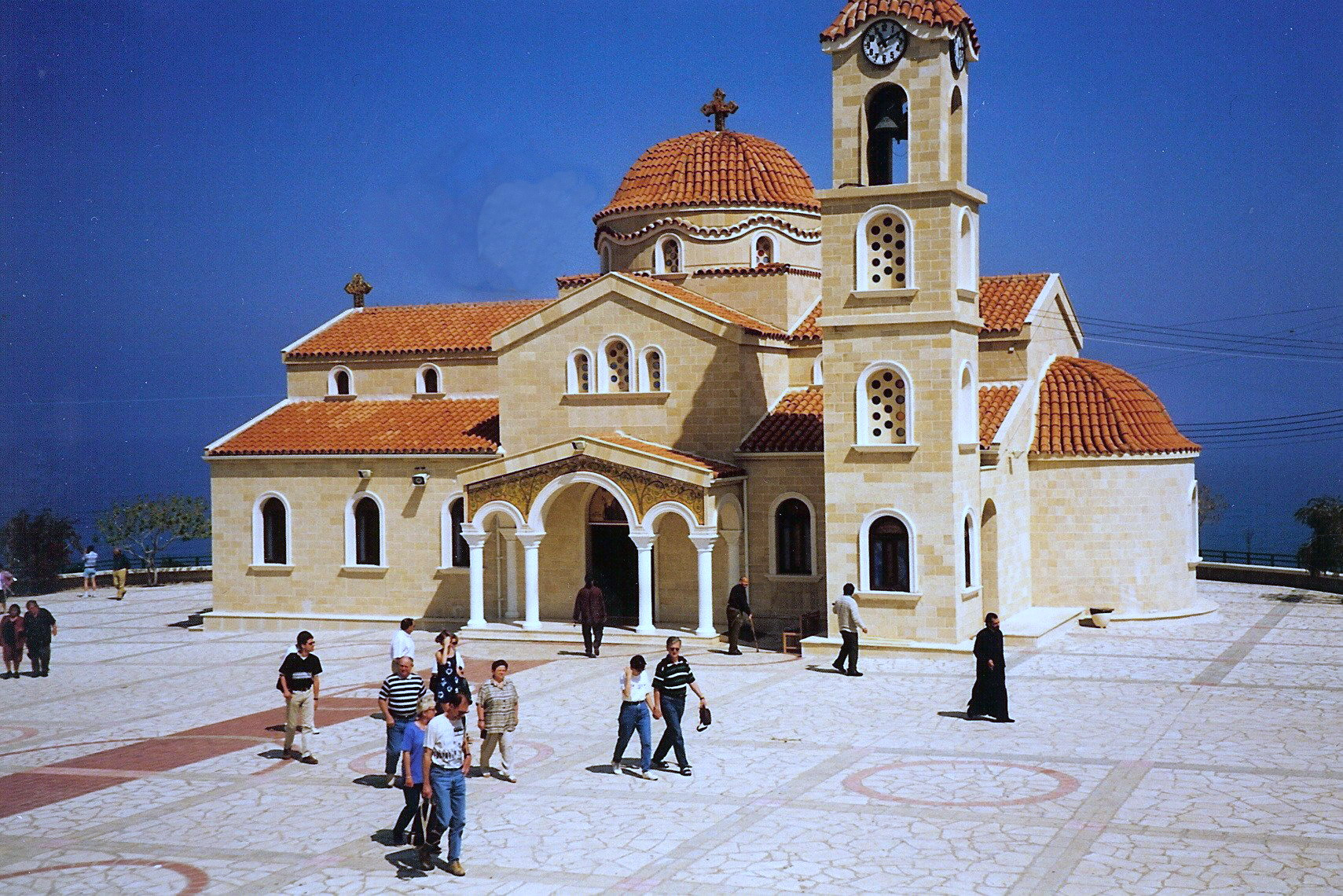 Griechisch-orthodoxe Kirche in Kato Pyrgos